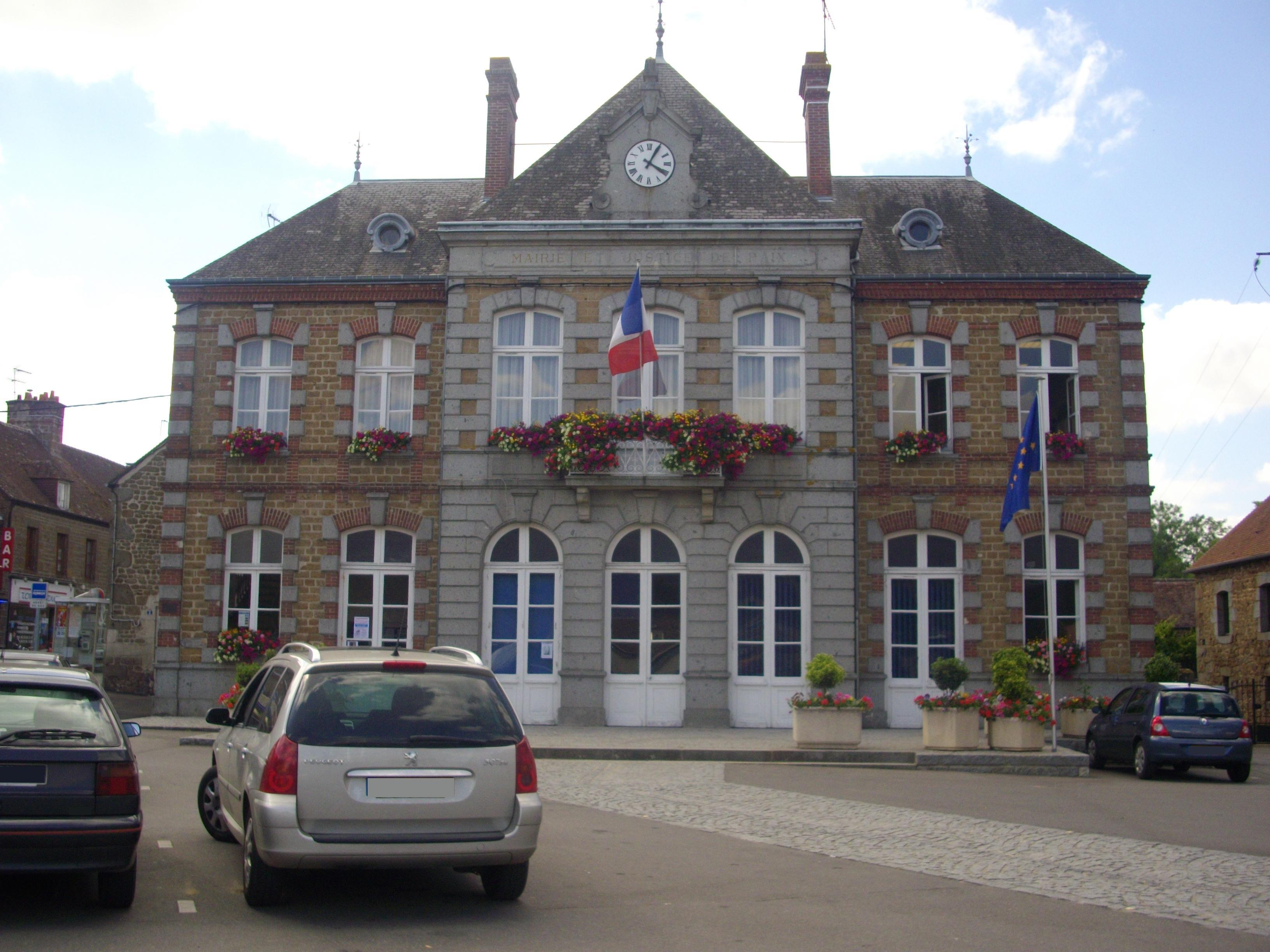 Mairie de Putanges-Pont-Ecrepin, Basse-Normandie, France